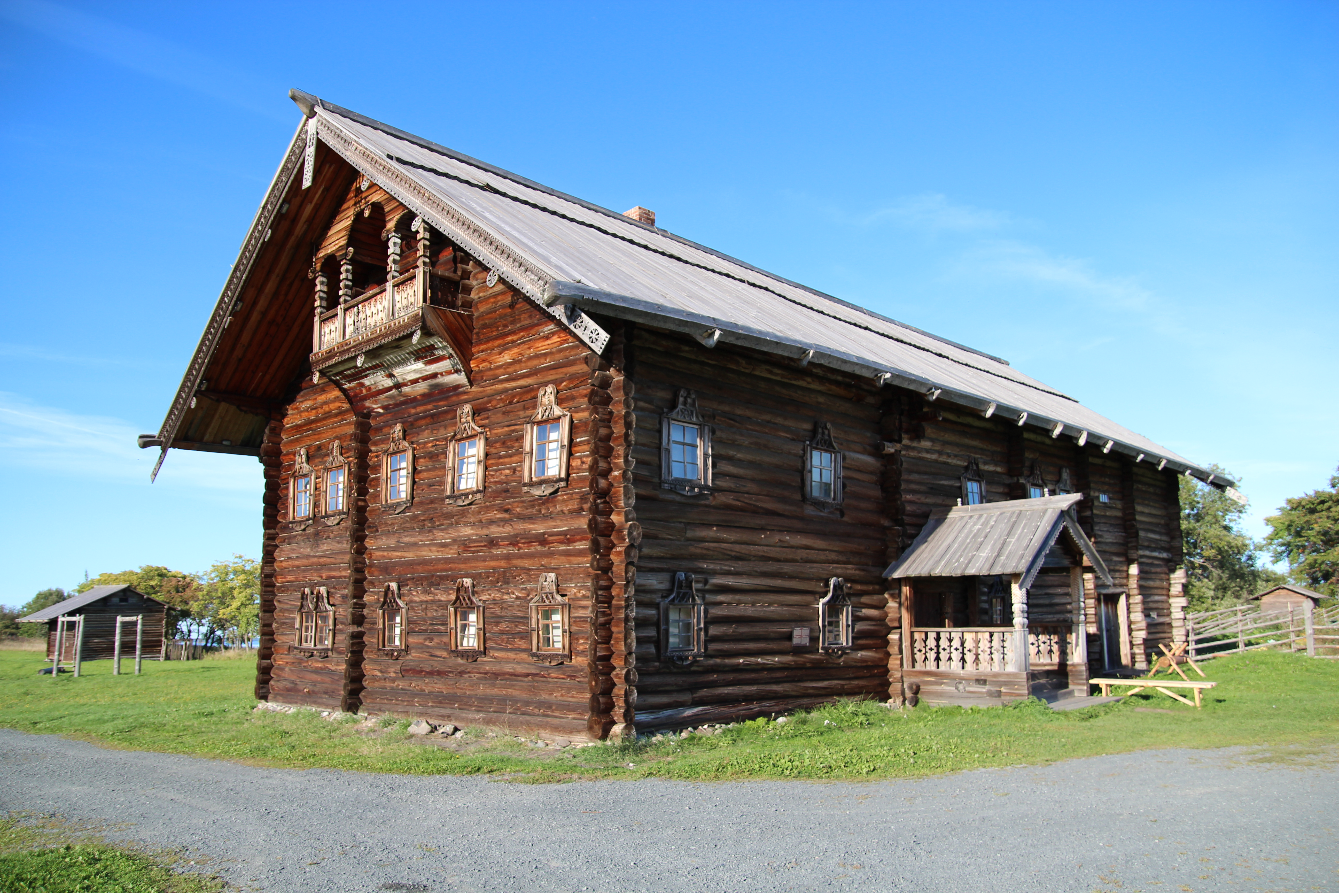 дом Яковлева